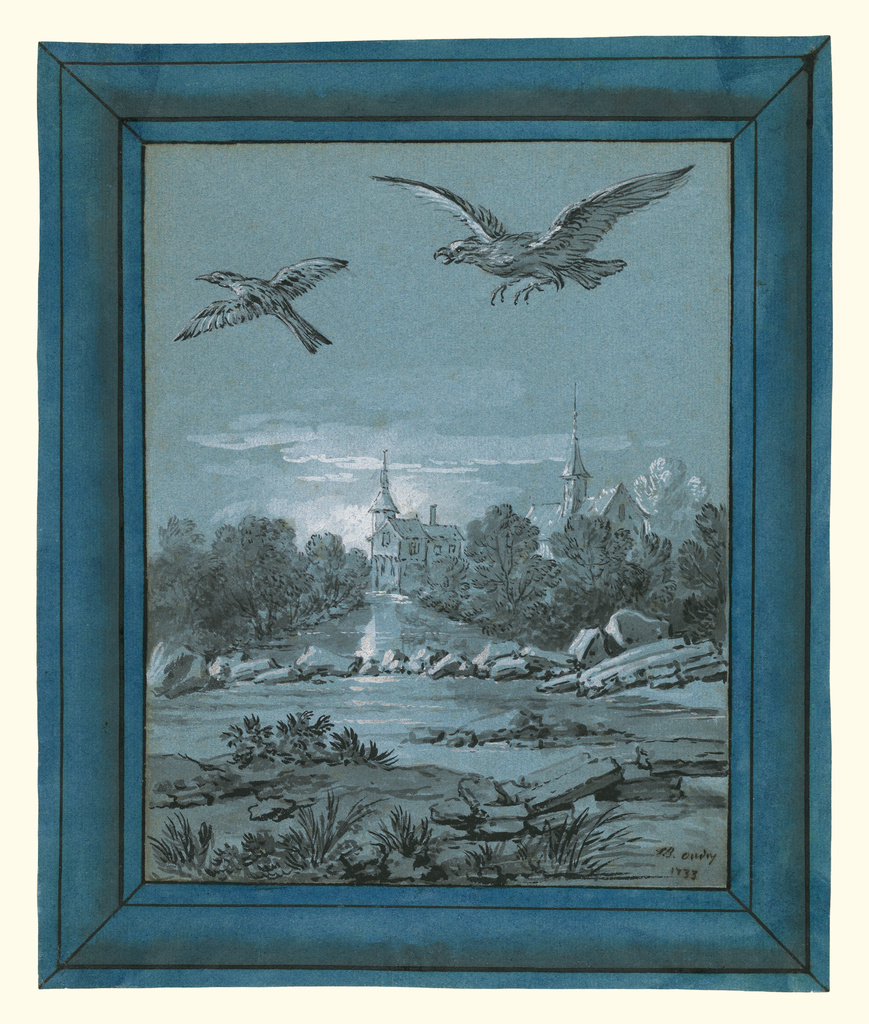 Jean-Baptiste Oudry: Der Adler und die Elster (L'aigle et la pie / The Eagle and the Magpie), 30,6x25,6 cm, 1729-1734, lavierte Feder- und Pinselzeichnung mit Weißhöhungen auf blauem Papier. Illustration für die Fabeln von Jean de la Fontaine. J. Paul Getty Museum, Los Angeles.